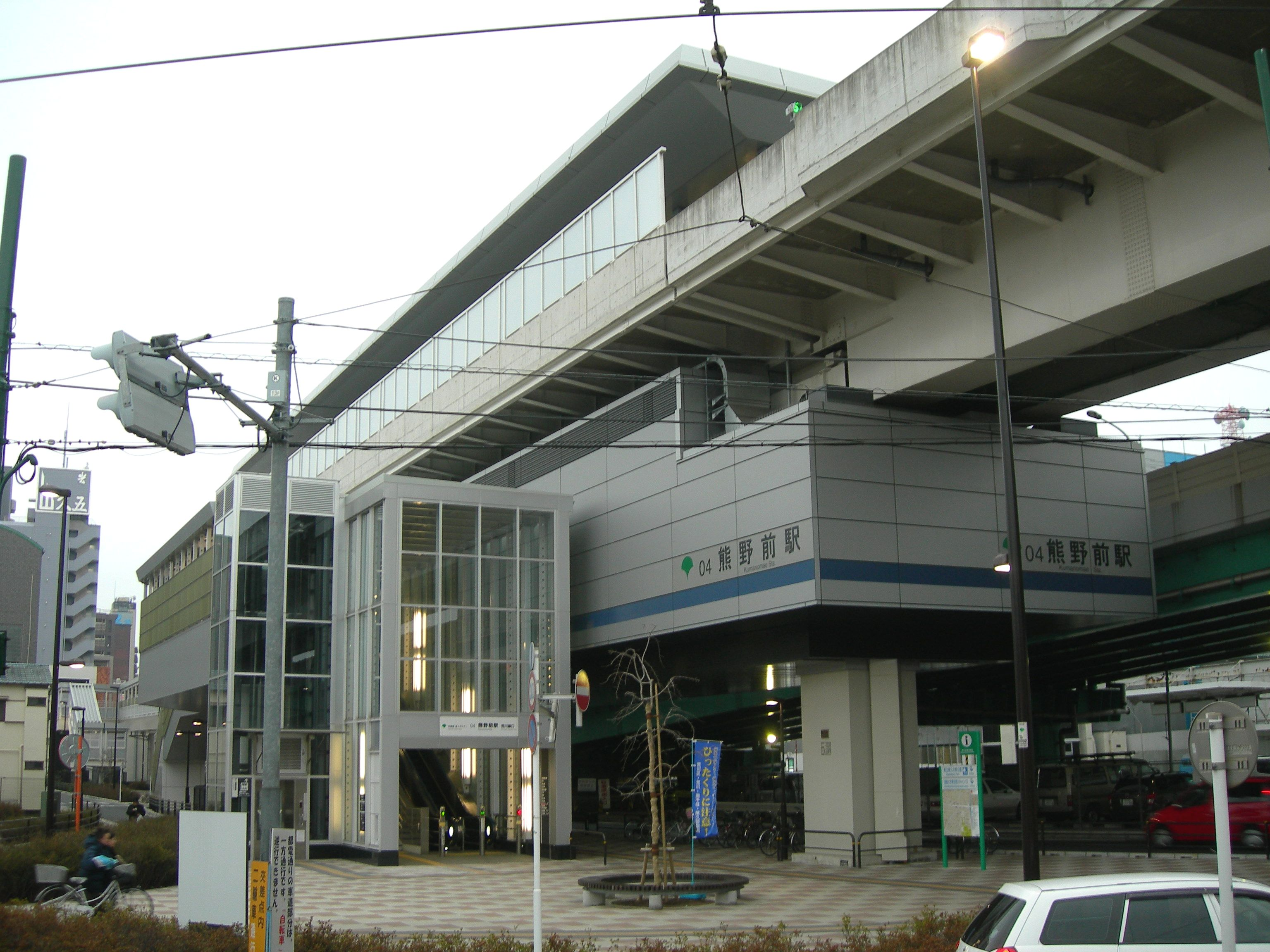 日暮里・舎人ライナー熊野前駅